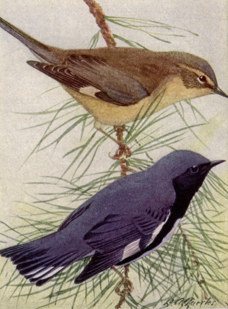 BLACK-THROATED BLUE WARBLER. Dendroica caerulescens Female and Male.